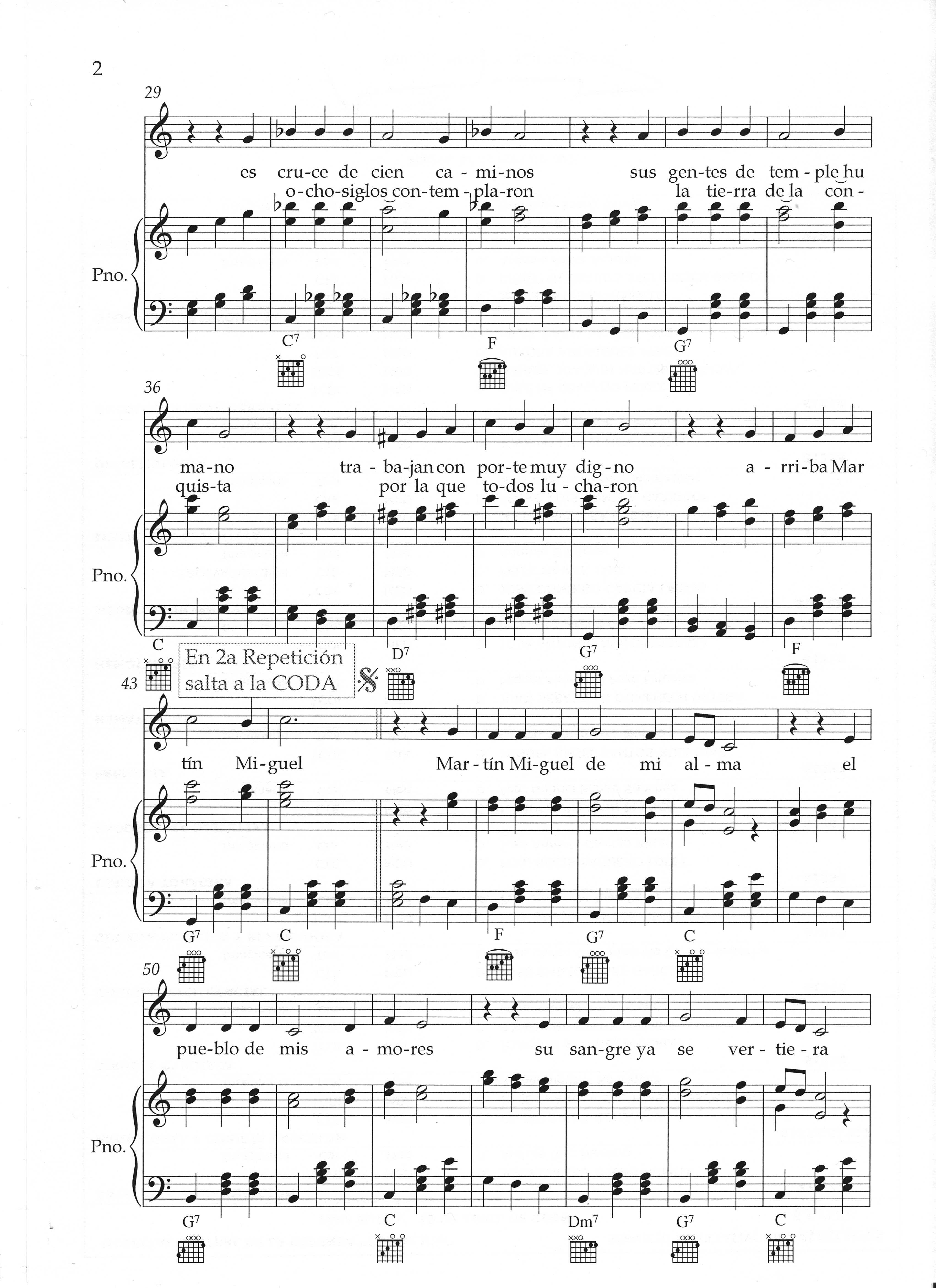 hoja 2 de la partitura para piano y voz del himno a Martín Miguel